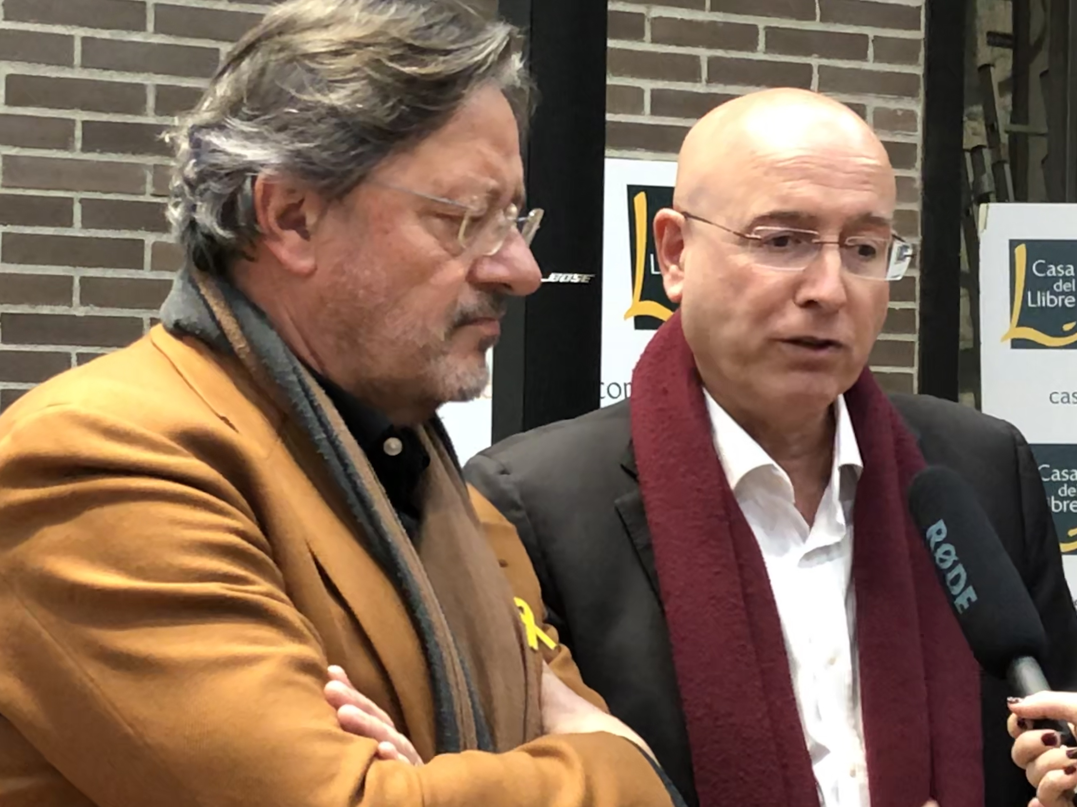 Presentación libro Obertura Republicana